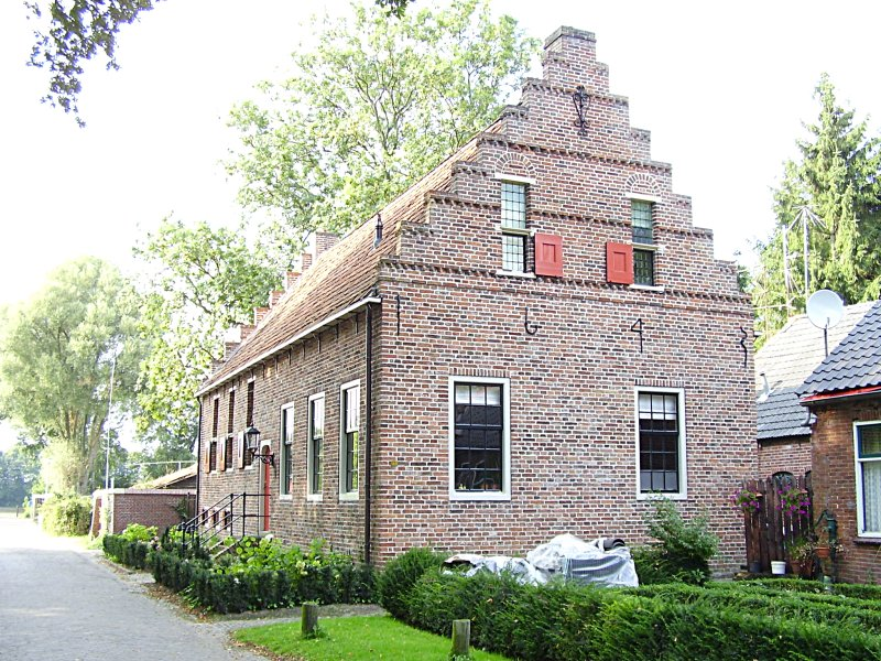 Het rechthuis in Bellingwolde, foto genomen door Marco Roepers op 08-09-2005